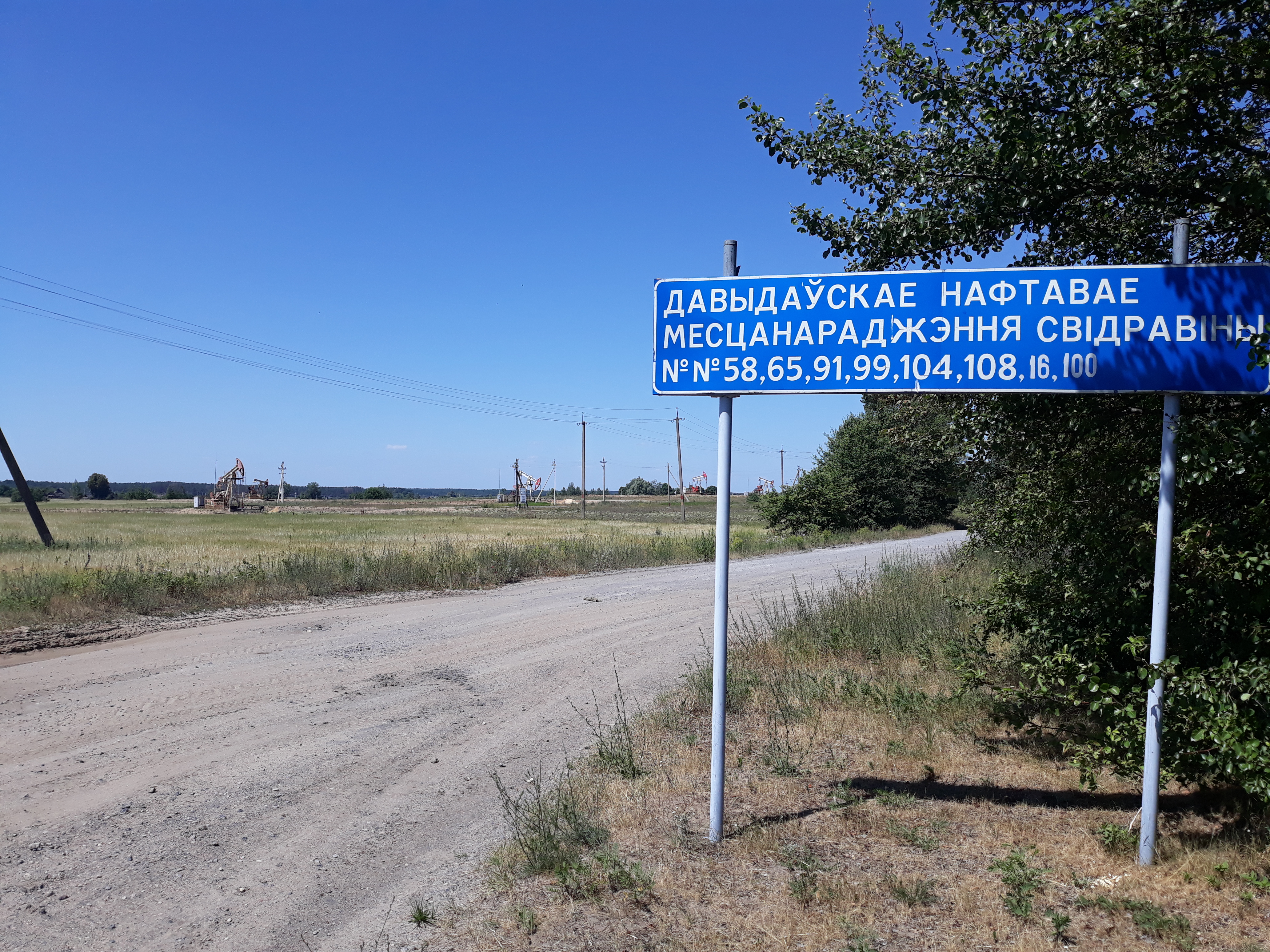 Давыдоўскае нафтавае радовішча